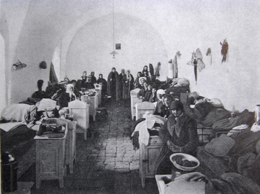 Русские православные паломницы в общих палатах Мариинского подворья в Иерусалиме. Фото Ф.М. Тимона. 1907 г.